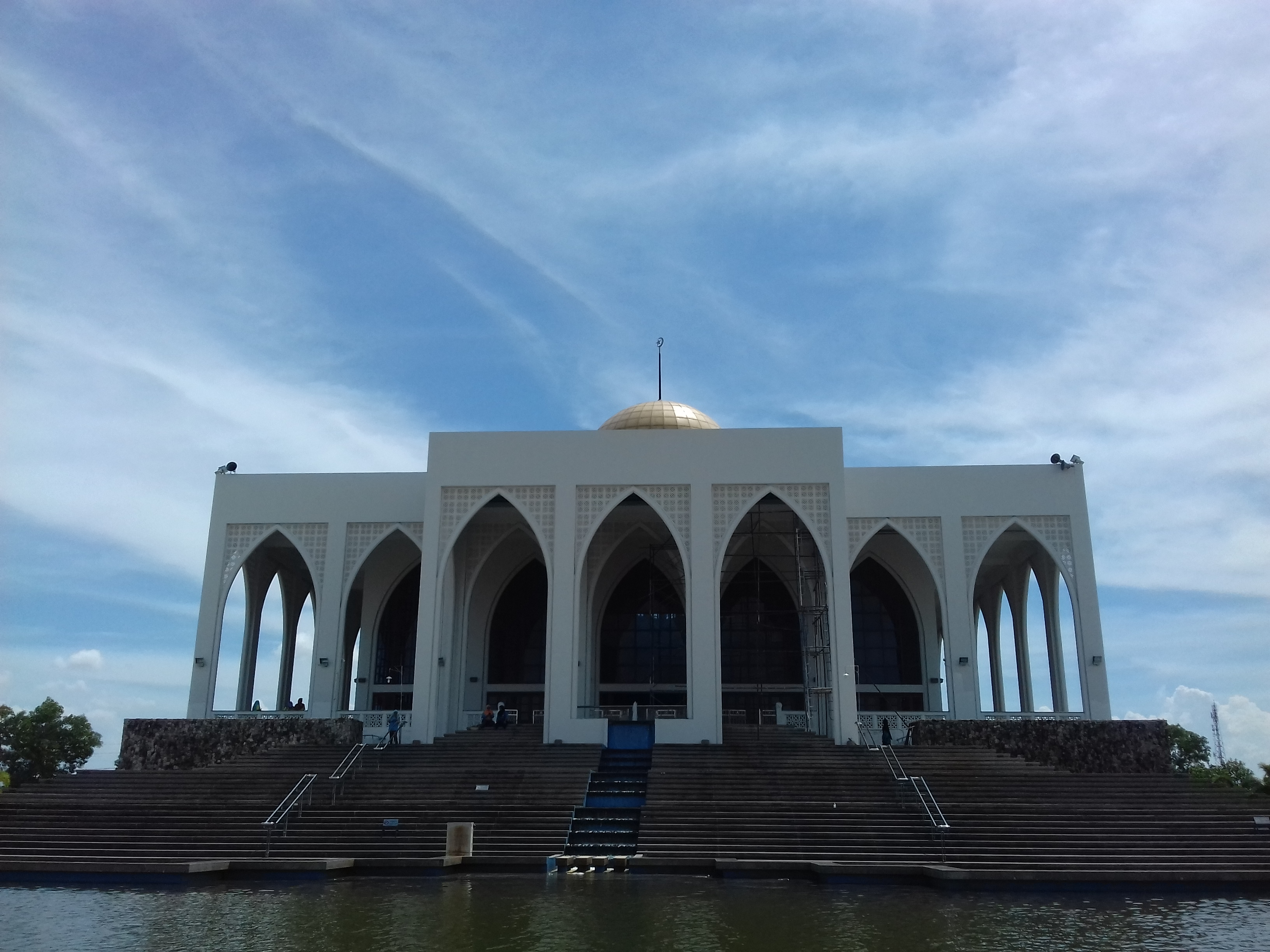 Pemandangan hadapan Masjid Pusat Songkhla